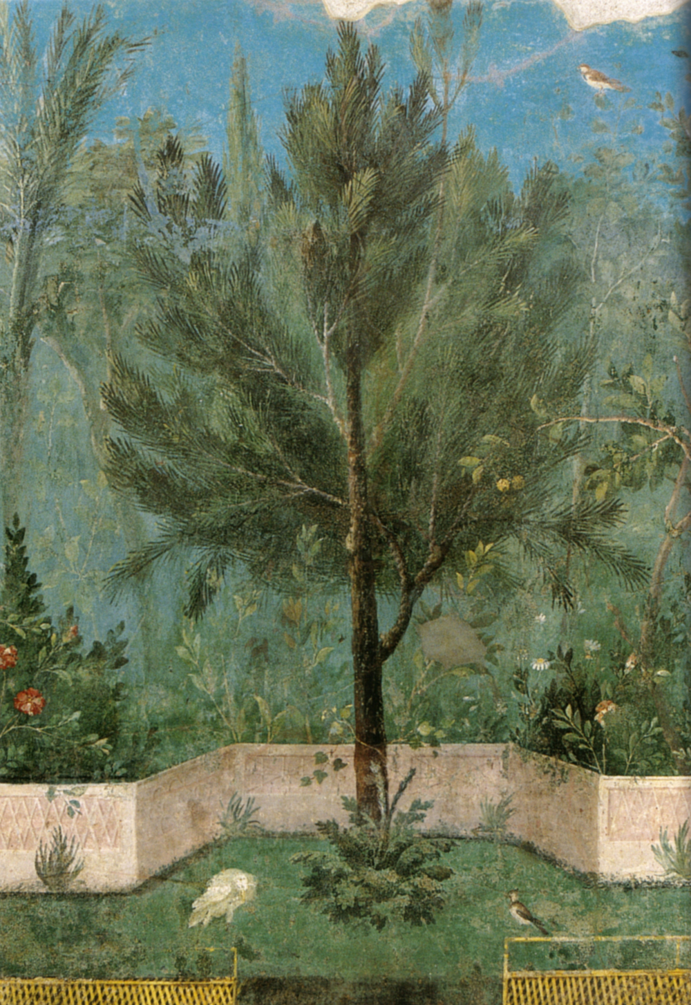 Villa di livia, affreschi di giardino, parete corta settentrionale, pino